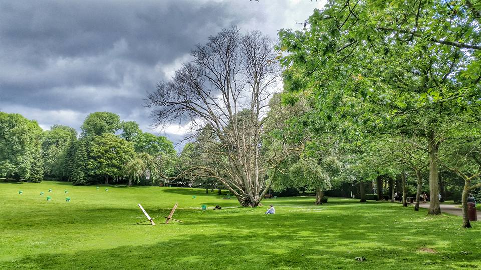 Hobuch op der Kinnekswiss am Juli 2016